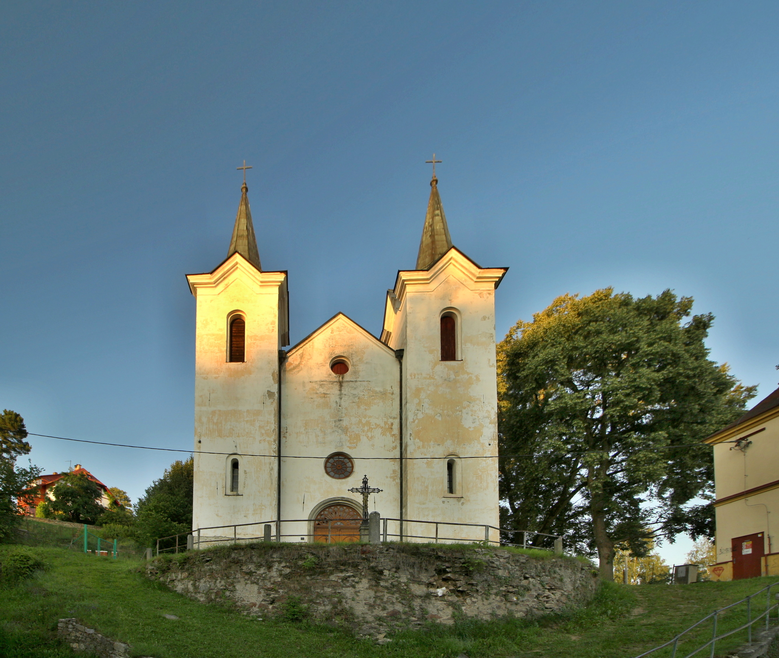 Kašperské Hory, kostel Panny Marie sněžné